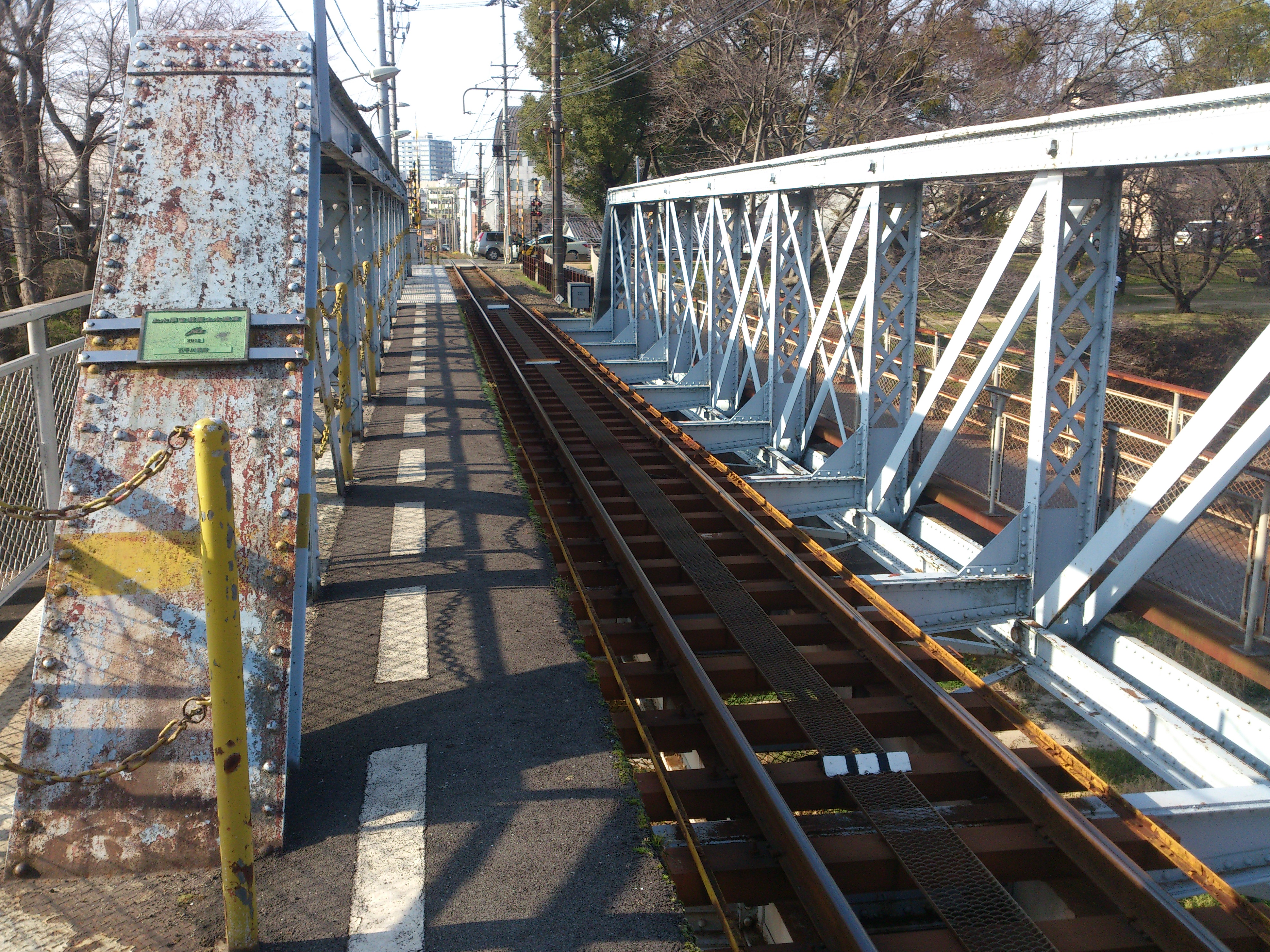 石手川公園駅 橋梁上ホーム